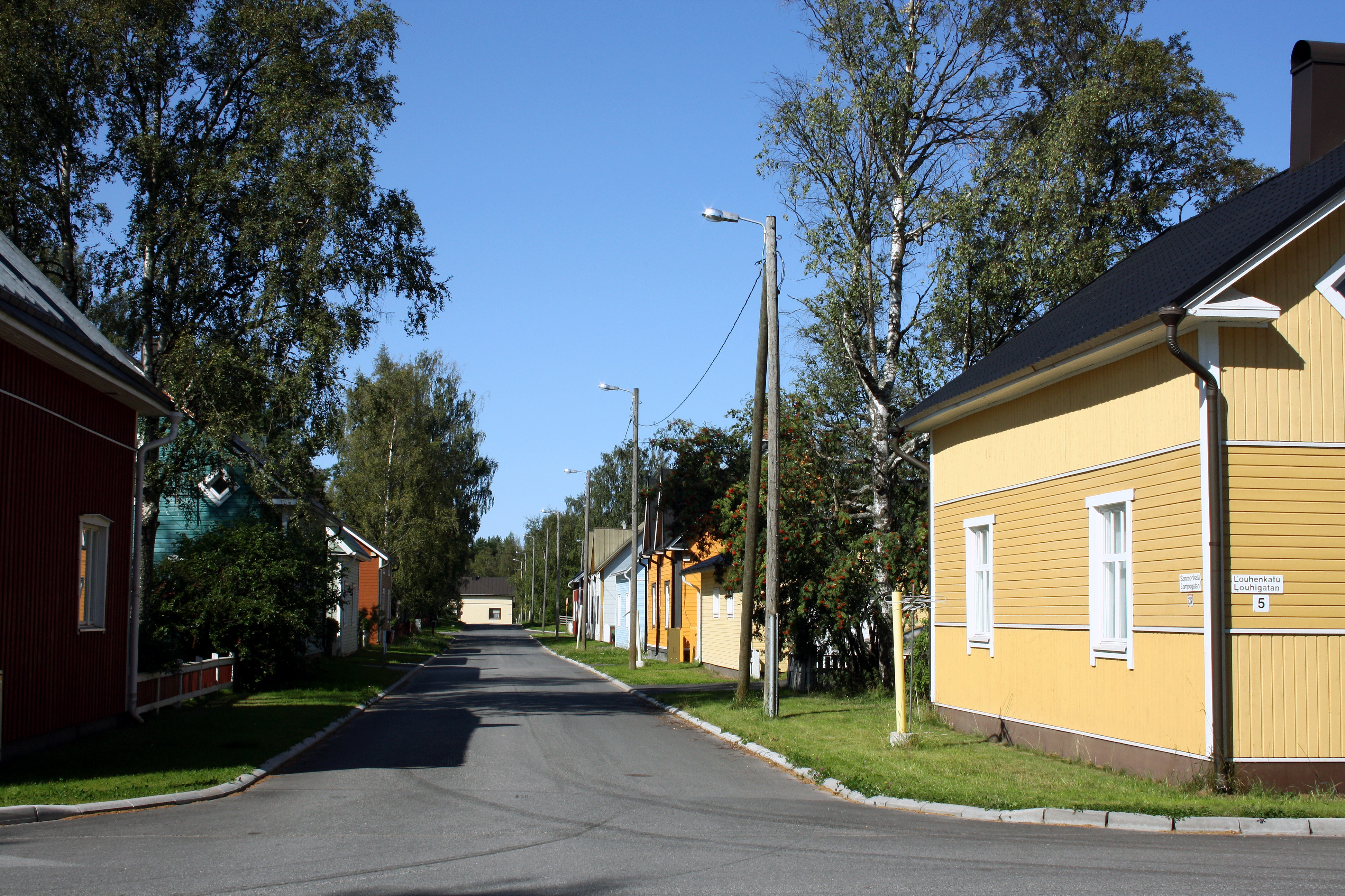 Ykspihlajan kaupunginosaa Kokkolassa, Suomessa.